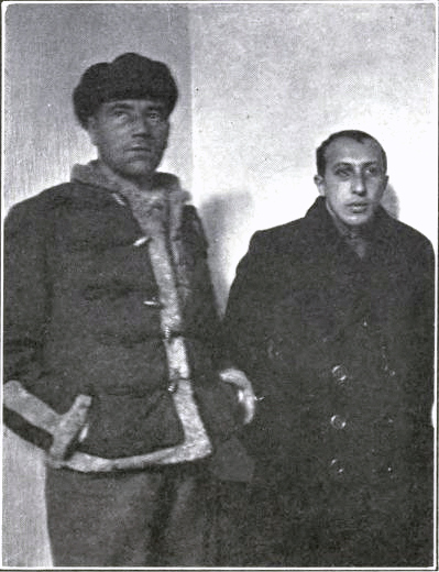 Joseph Czerny, comandante de los "chicos de Lenin" (izquierda) y el presidente del tribunal revolucionario Otto Korvin-Klein.